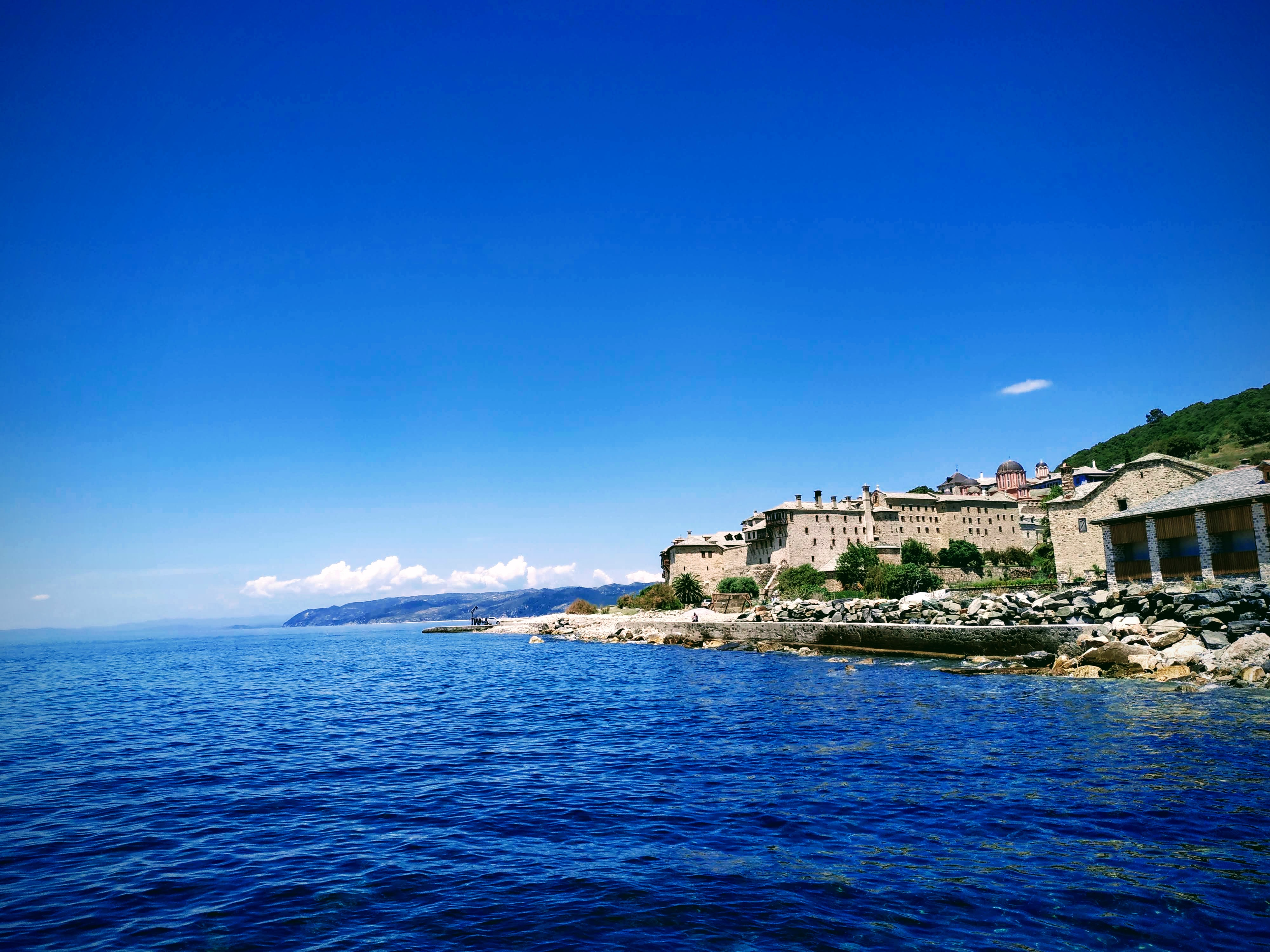 монастир Ксенофонт вигляд з причалу де прибуває корабель на Уранаполіс. 2019 рік.